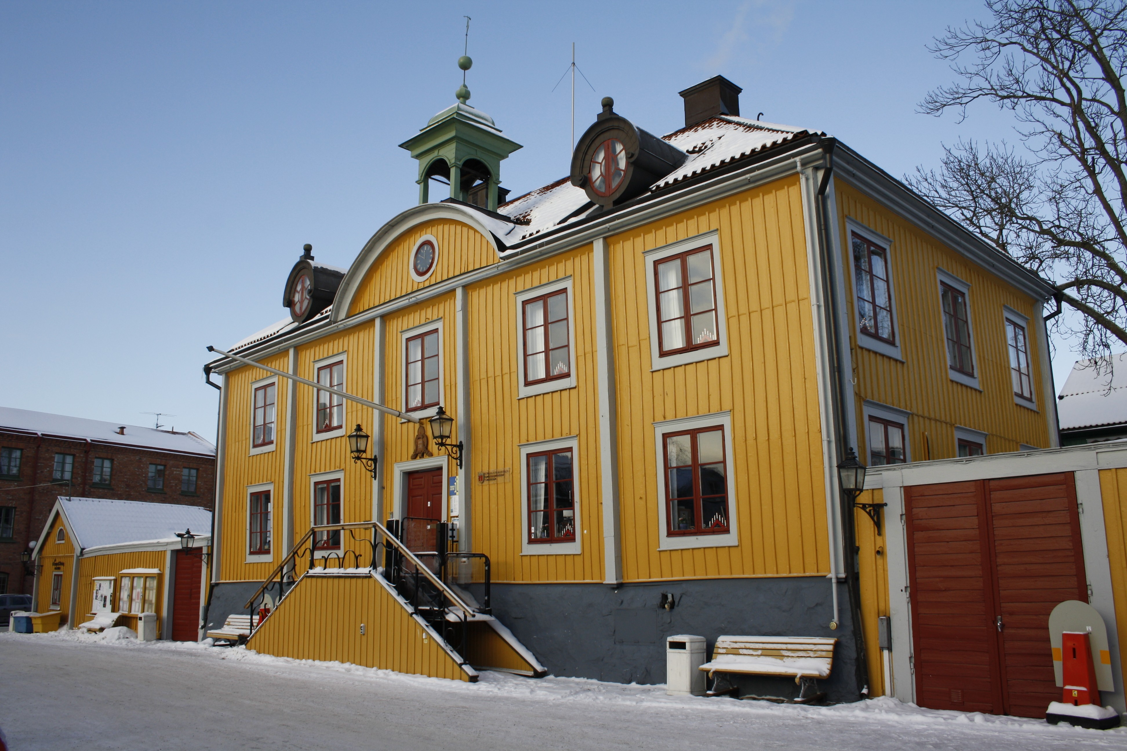 Rådhuset i Mariefred, Södermanland, Sverige